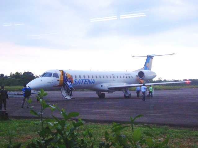 Embraer ERJ 145 de Satena en plataforma del Aeropuerto Gustavo Artunduaga de Florencia, Caquetá